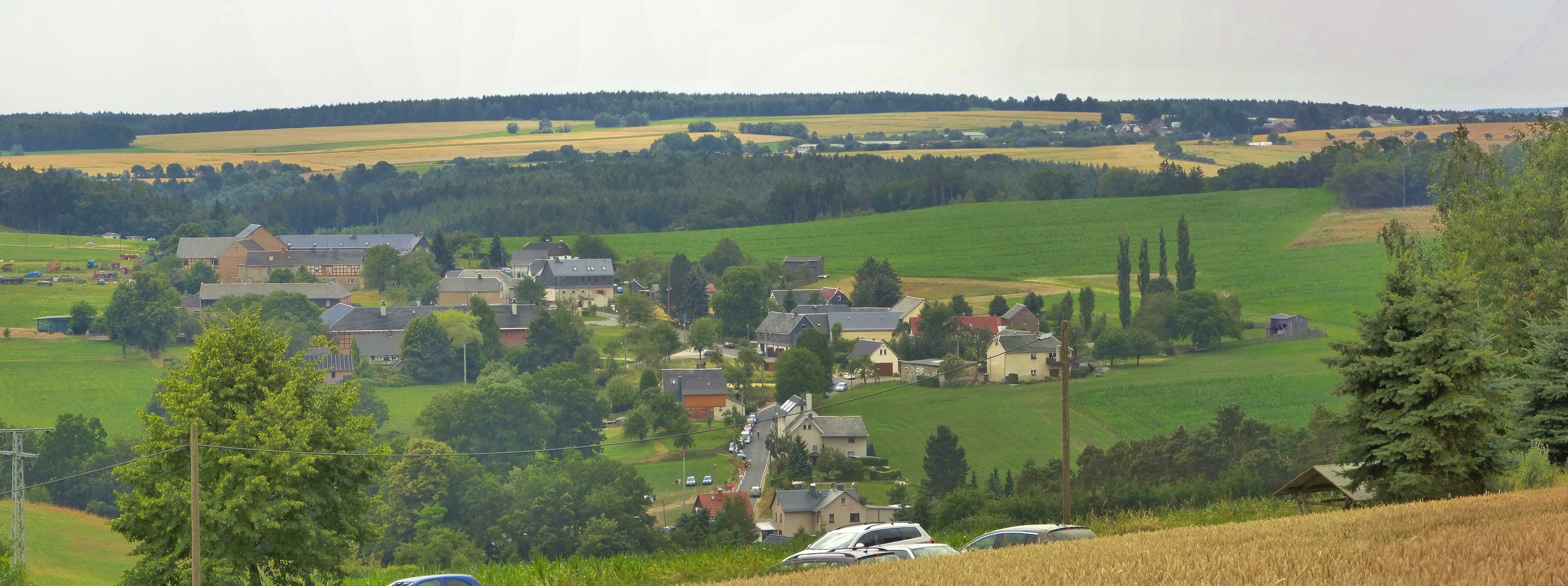 Lunzig in der Landschaft